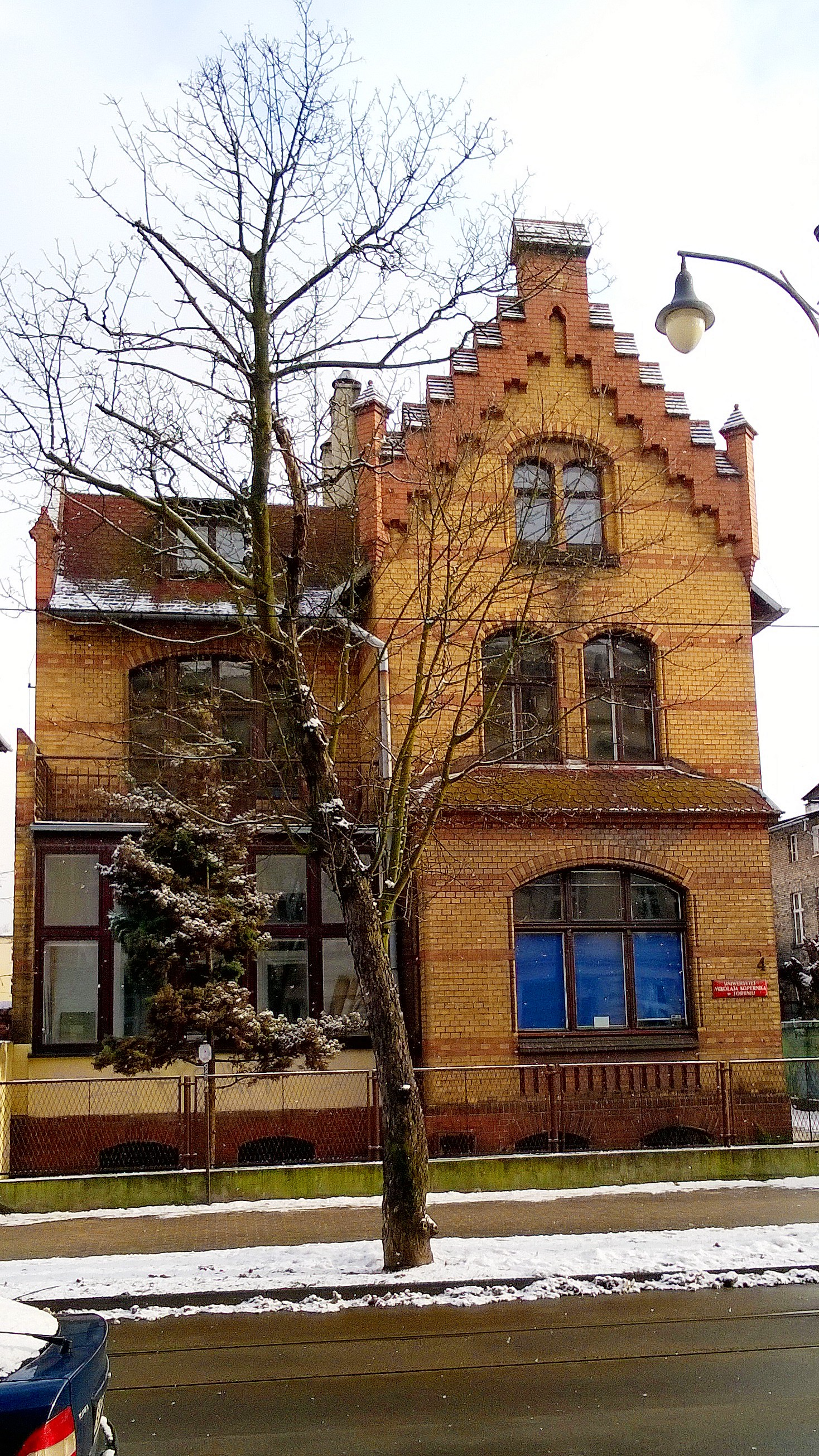 Neogotycki budynek Zakładu Edukacji Artystycznej Wydziału Sztuk Pięknych UMK